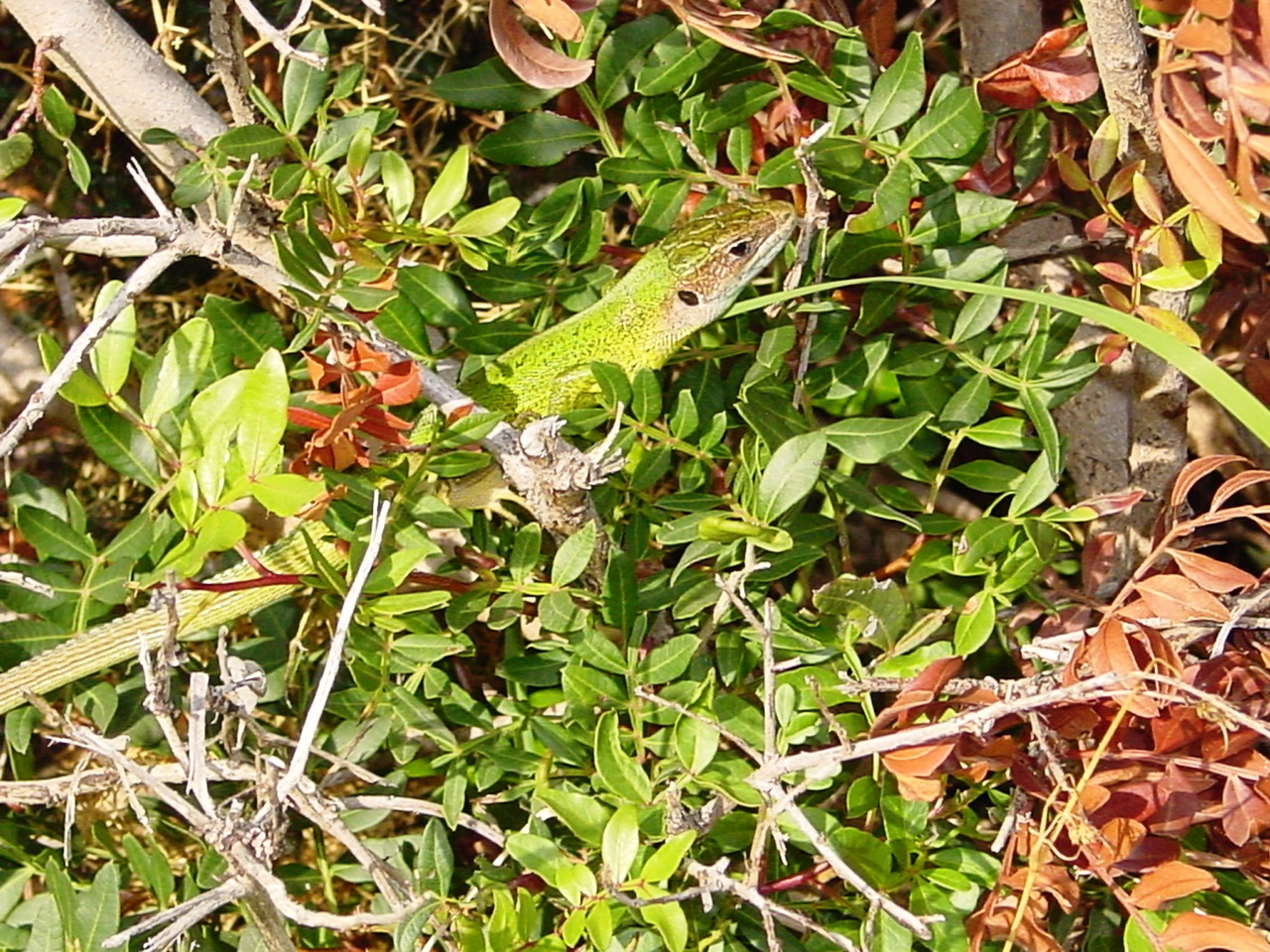 Lacerta bilineata Riserva dello Zingaro, Sicily